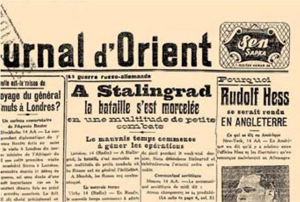 Fransızca, Le Journal d'Orient'te yayınlanan Şen Şapka ilanı 1942 yılına aittir.